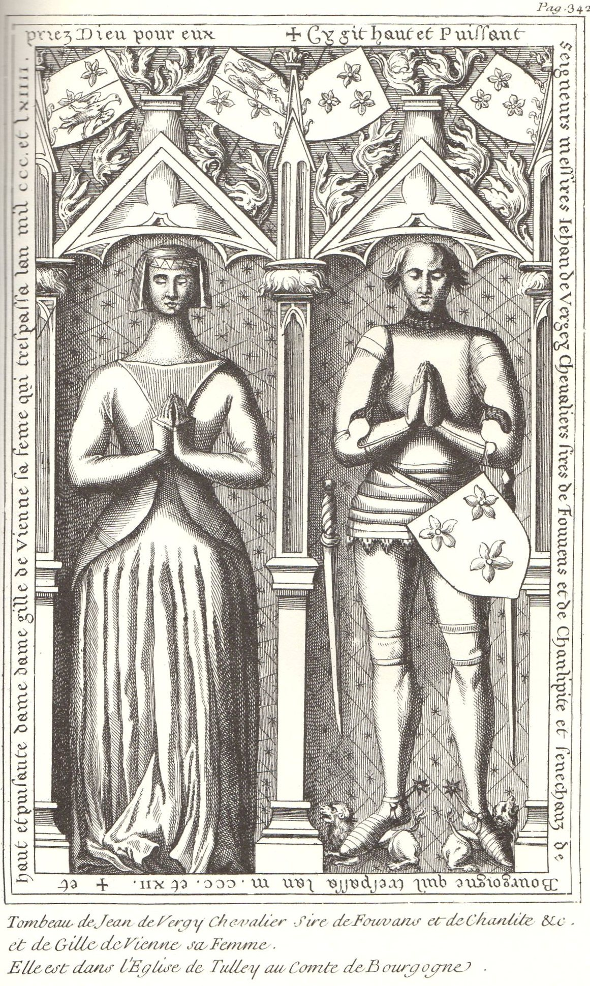 Tombe de Jean de Vergy et de Gille de Vienne sa femme relevé pour Gaignières.